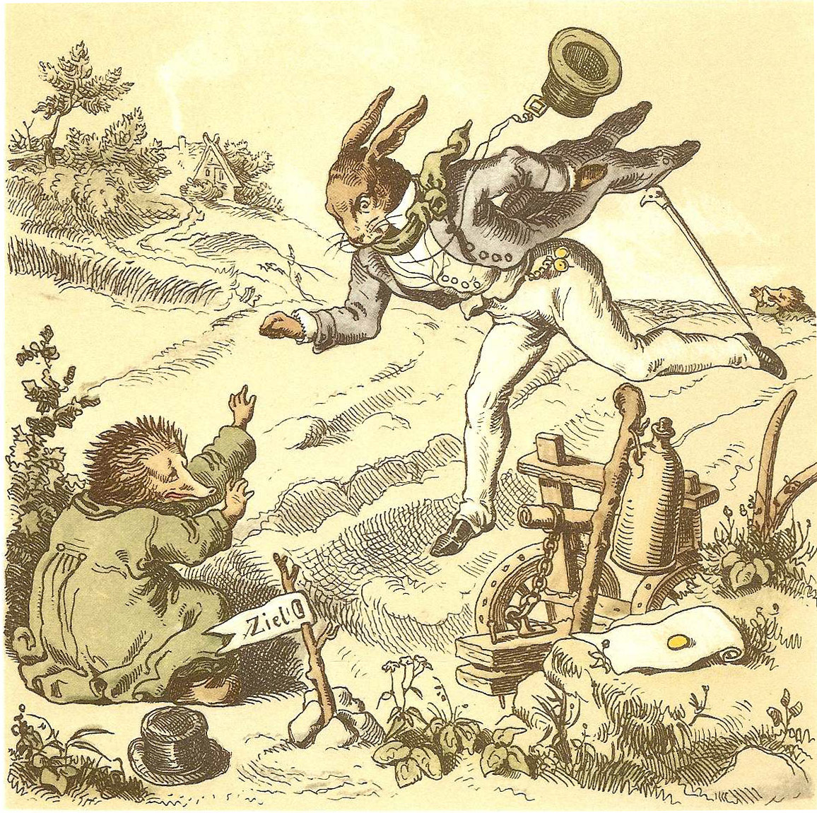 Het Wettloopen tüschen den Haasen un den Swinegel